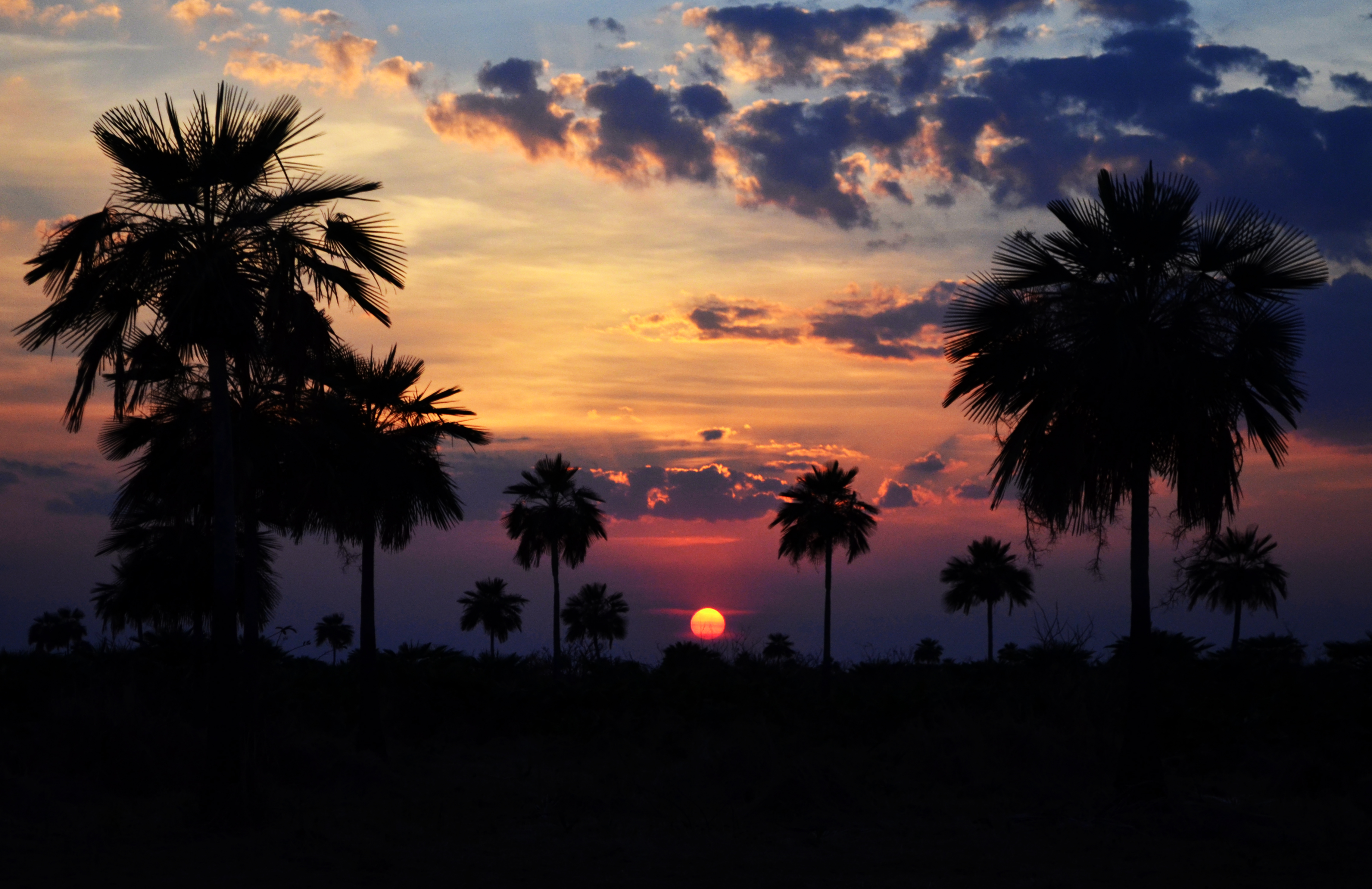 En Camaguán Estado Guárico se encuentra La Reserva de Fauna Silvestre "Esteros de Camaguán" que ofrece los mejores atardeceres. Son los más grandes de nuestro país, protagonista de múltiples coplas inspiradas en éste hermoso paisaje llanero que invitan a admirar su belleza natural. Como muestra de ello existe la canción "Esteros de Camaguán" escrita por el maestro Juan Vicente Torrealba.